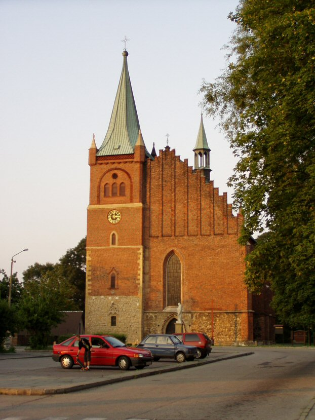 Zator (województwo małopolskie) - kościół